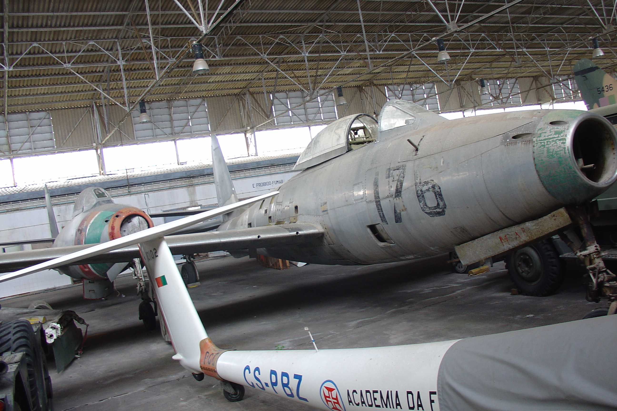 Este F84G pertence ao Museu do Ar da Força Aérea Portuguesa, tendo passado para o Museu em 1964. A primeira vez que olhei os números de identificação e os vi "vandalizados" ergui involuntariamente o sobrolho. Numa inspecção mais próxima o estado de espírito mudou. Reparem nas datas: 1967. O avião deve ter estado exposto à inclemência da "tropa" e o vandalismo transporta agora consigo um significado histórico importante. Espero que a haver um restauro sejam tomadas providências para salvaguardar este verdadeiro testemunho d'época...